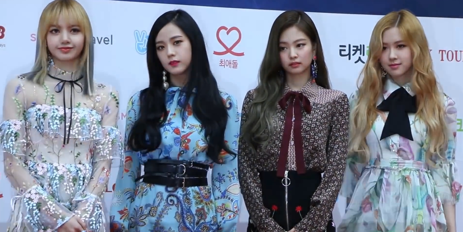 [TV10] 2월 22일 '제6회 가온차트 뮤직 어워즈' 레드카펫 현장